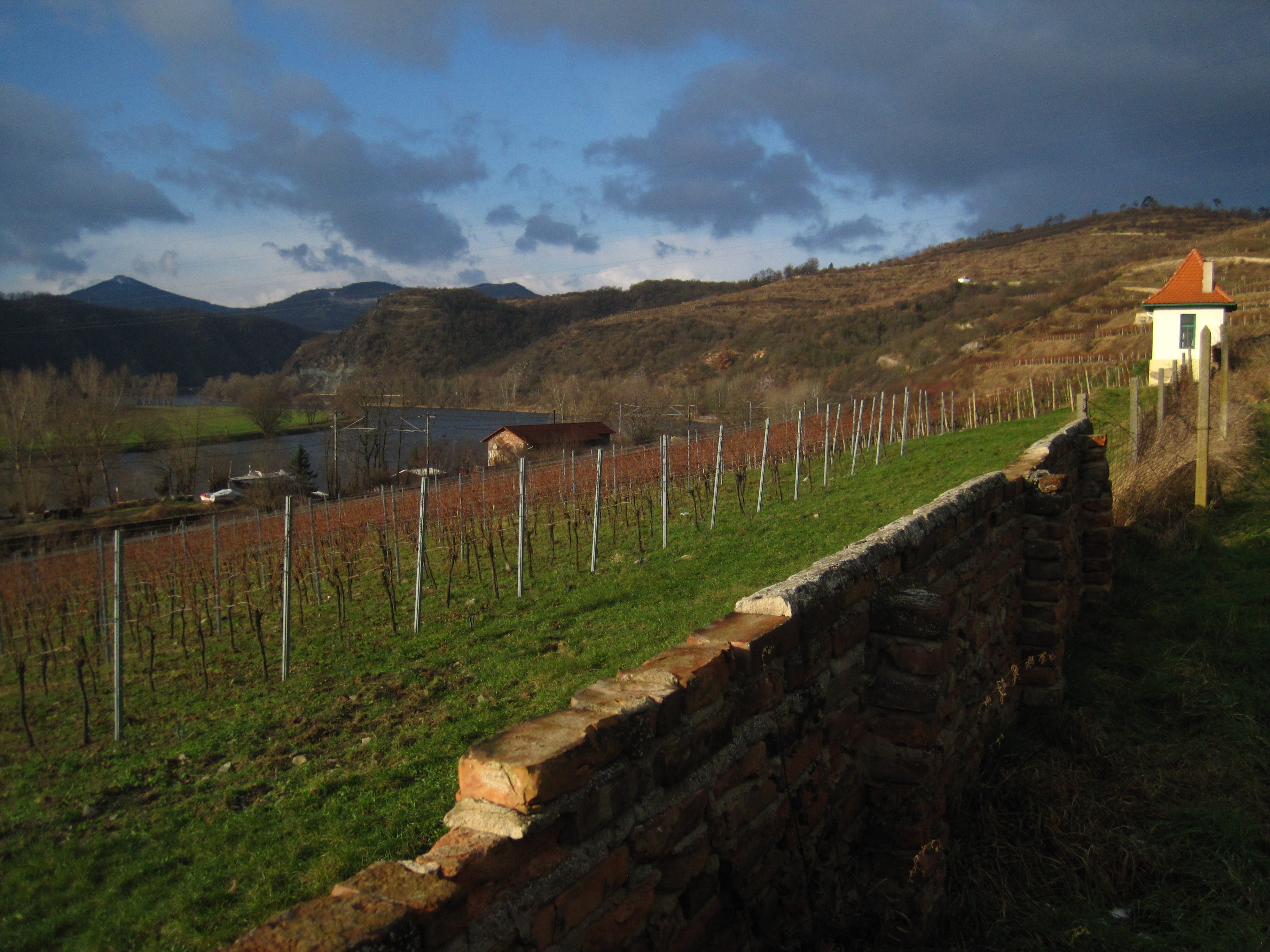 Soubor 4 viničních domků, Velké Žernoseky.